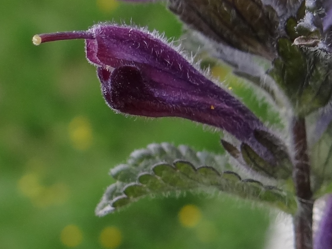 Bartsia alpina (habitat:West Tatra Mountains, Ciemniak)